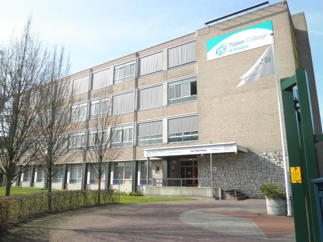 Tabor College locatie d'Ampte aan de Berkhouterweg 5.